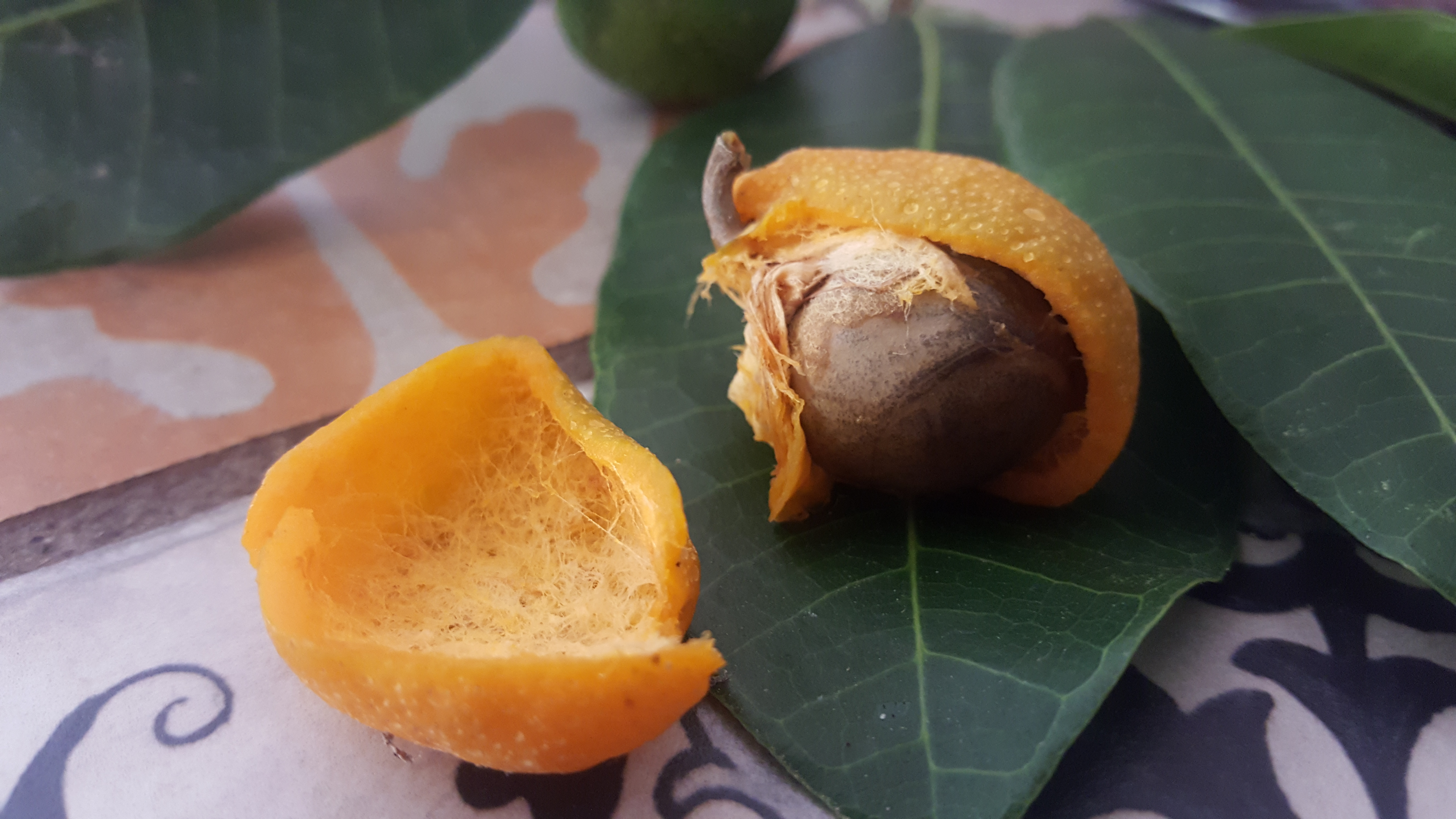 Samen und reife Frucht + Fruchtfleisch Querschnitt. Seed and ripe fruit